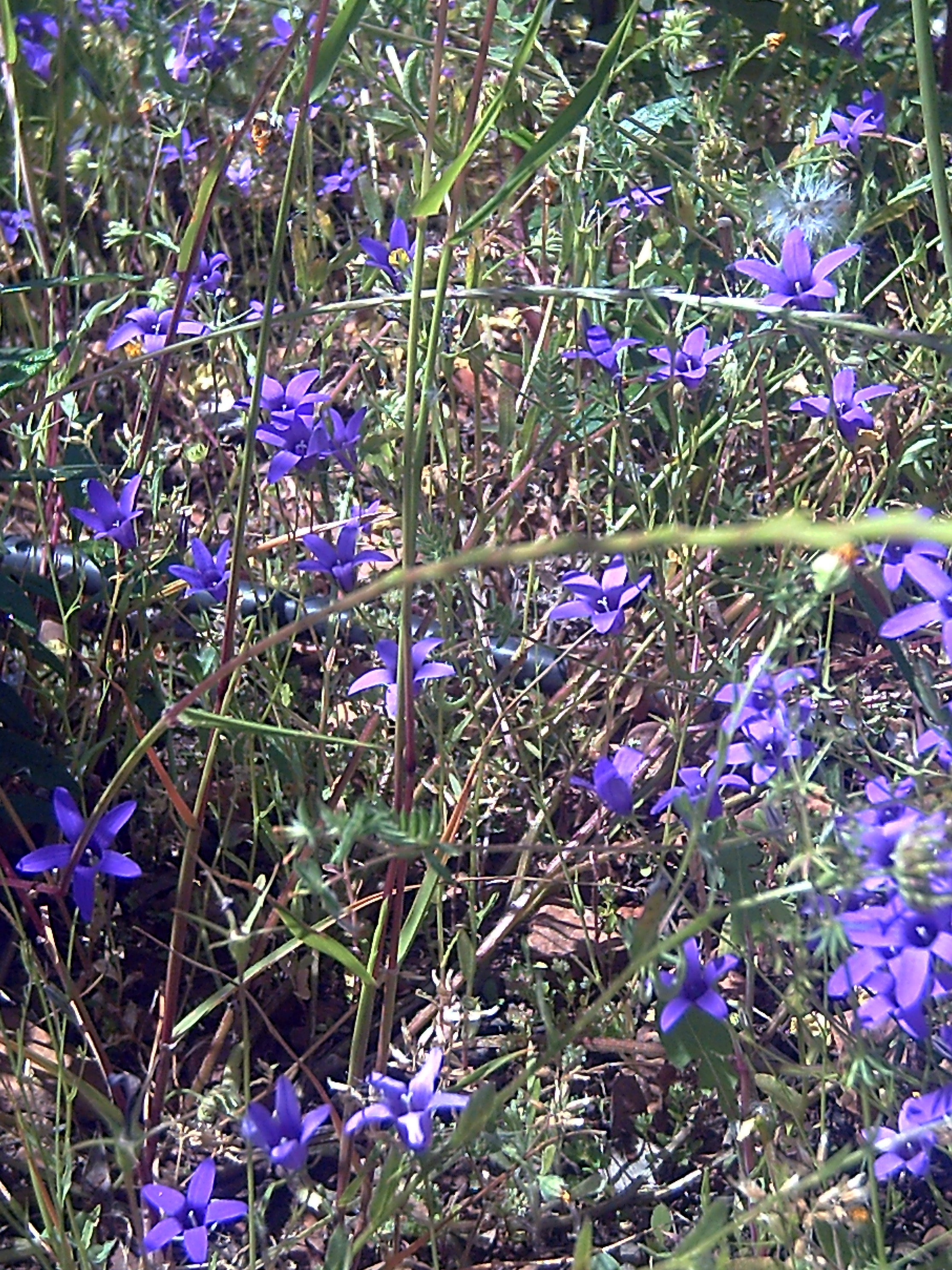 Campanula lusitanica subsp lusitanica habitus Dehesa Boyal de Puertollano